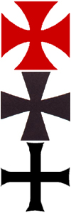 Das Tatzenkreuz in verschiedenen Ausführungen (Auswahl).